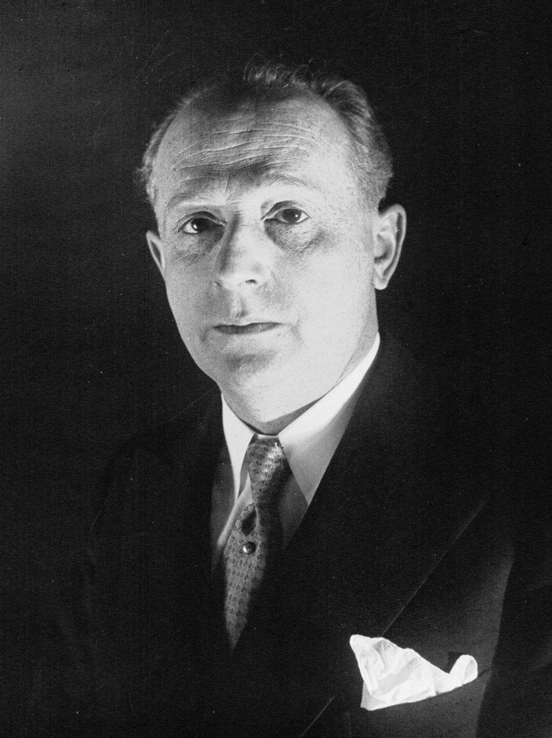 Georges Weil [sic], député du Bas-Rhin : photographie de presse